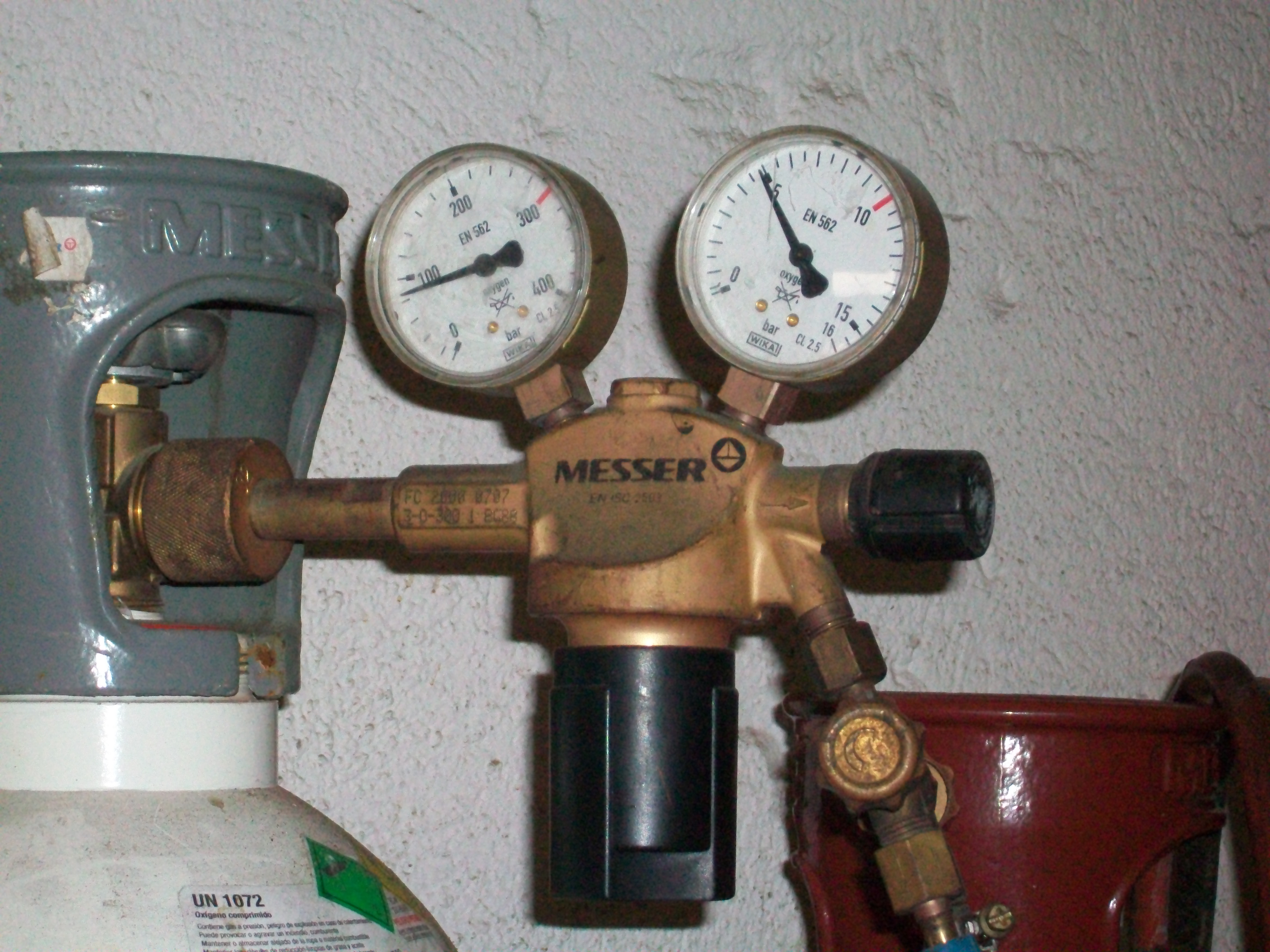 Imagen del manorreductore del oxigeno